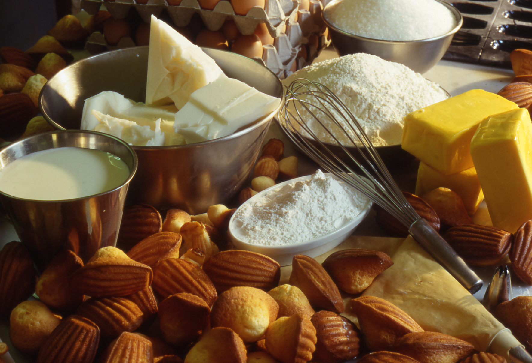 Recette pour la Madeleine